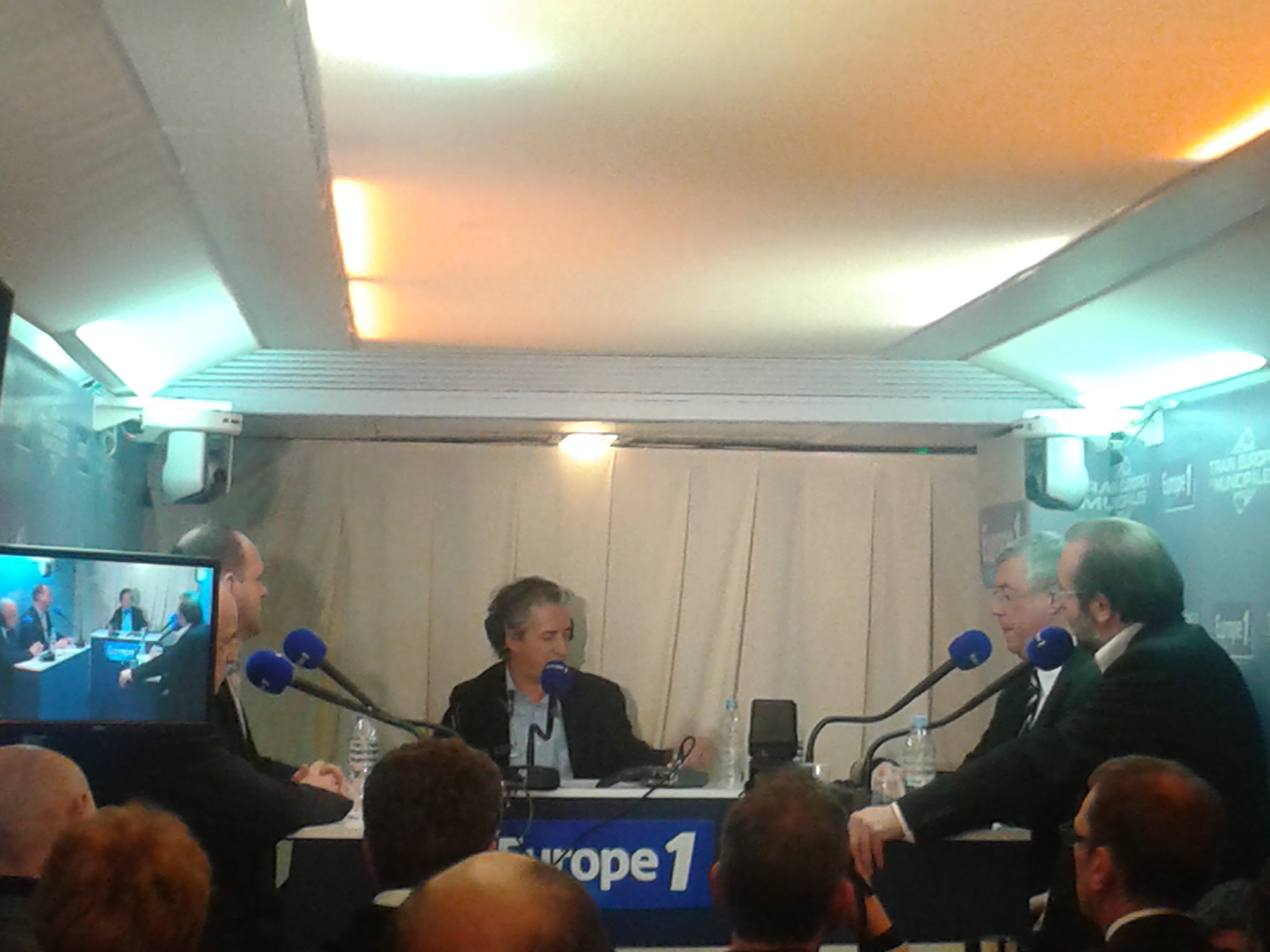 Emission "Europe soir" de la radio française Europe 1, délocalisé à Hénin-Beaumont, le 18 février 2014; dans le cadre de son "Train des municipales". Le présentateur Nicolas Poincaré (au centre) est entouré par Eugène Binaisse (à gauche, partiellement caché par un téléviseur), Steeve Briois (à gauche, derrière Binaisse), Gérard Dalongeville (devant à droite) et Jean-Marc Legrand (derrière Dalongeville ; à droite)